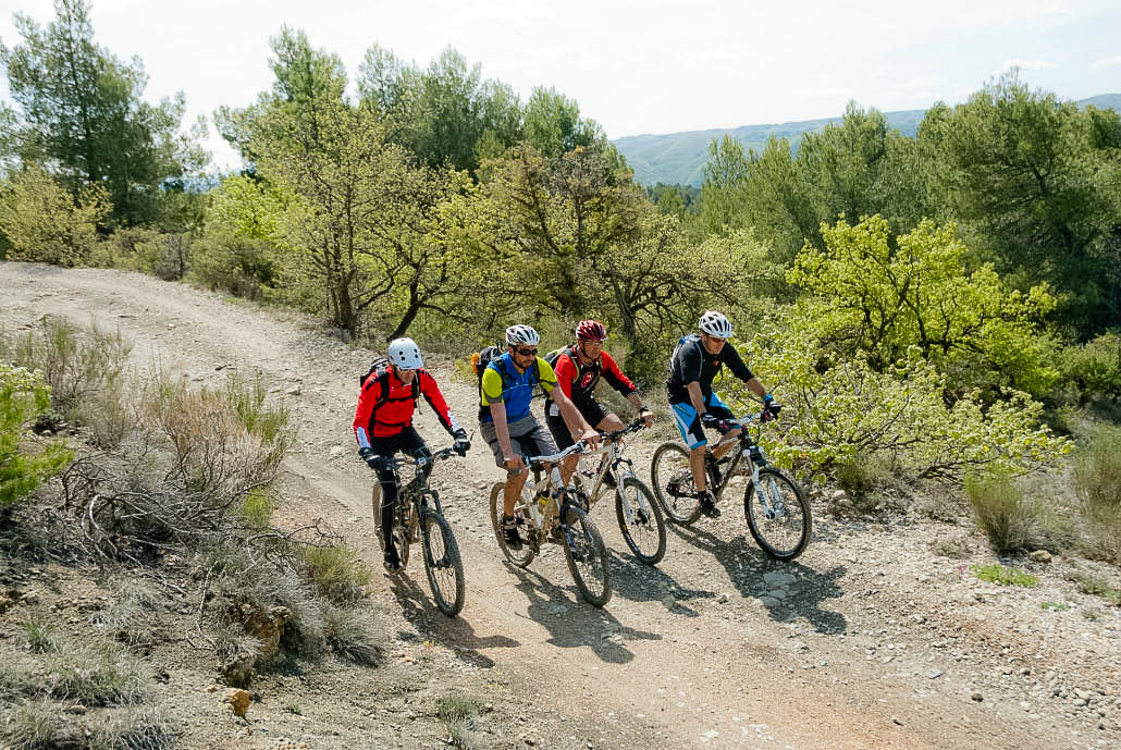 En VTT sur une draille